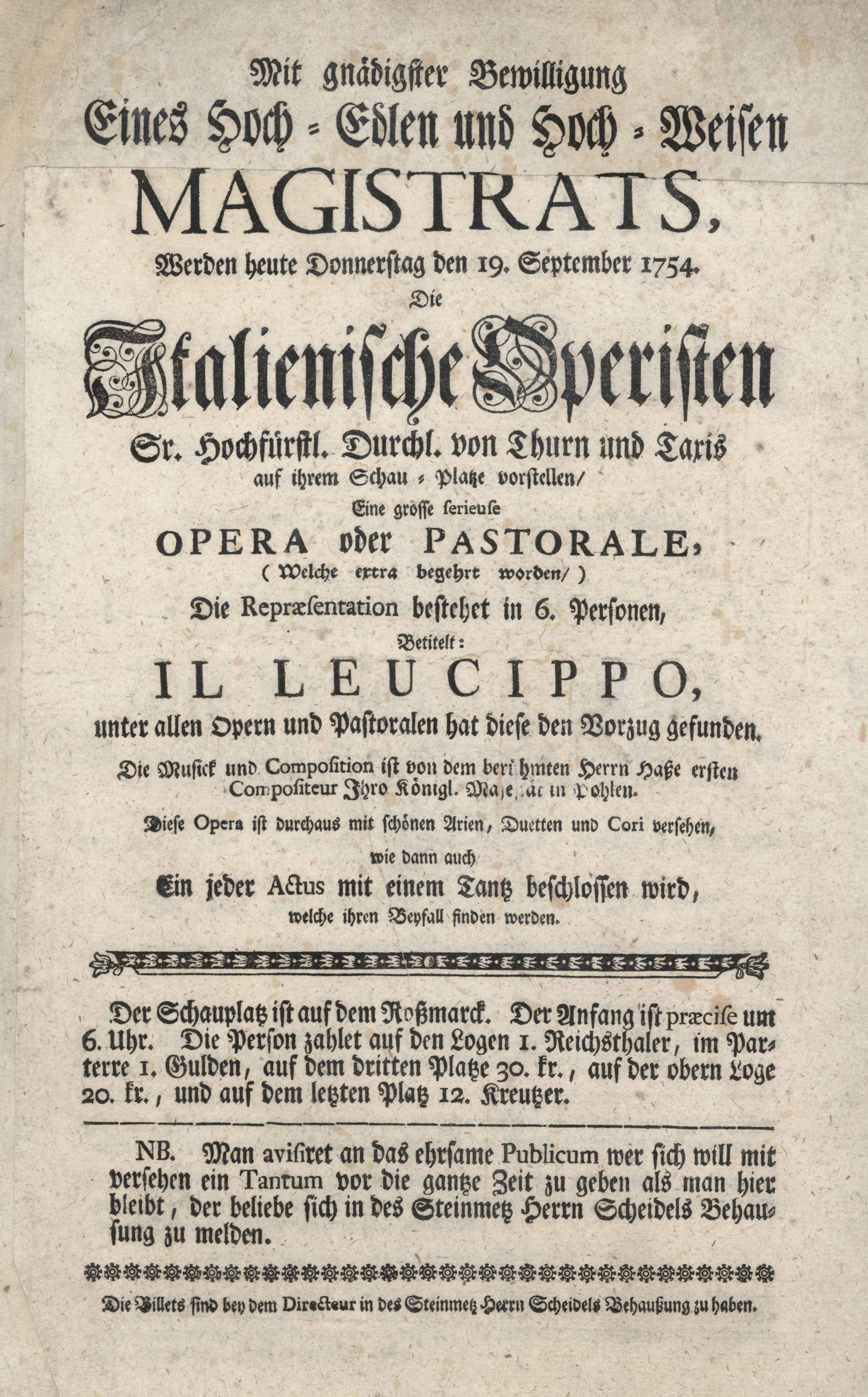 Frankfurter Premiere der Oper "Il Leucippo" von Johann Adolf Hasse durch die Thurn und Taxissche Operntruppe am 19. September 1754, unter der Direktion des Girolamo Bon. Detailausschnitt.